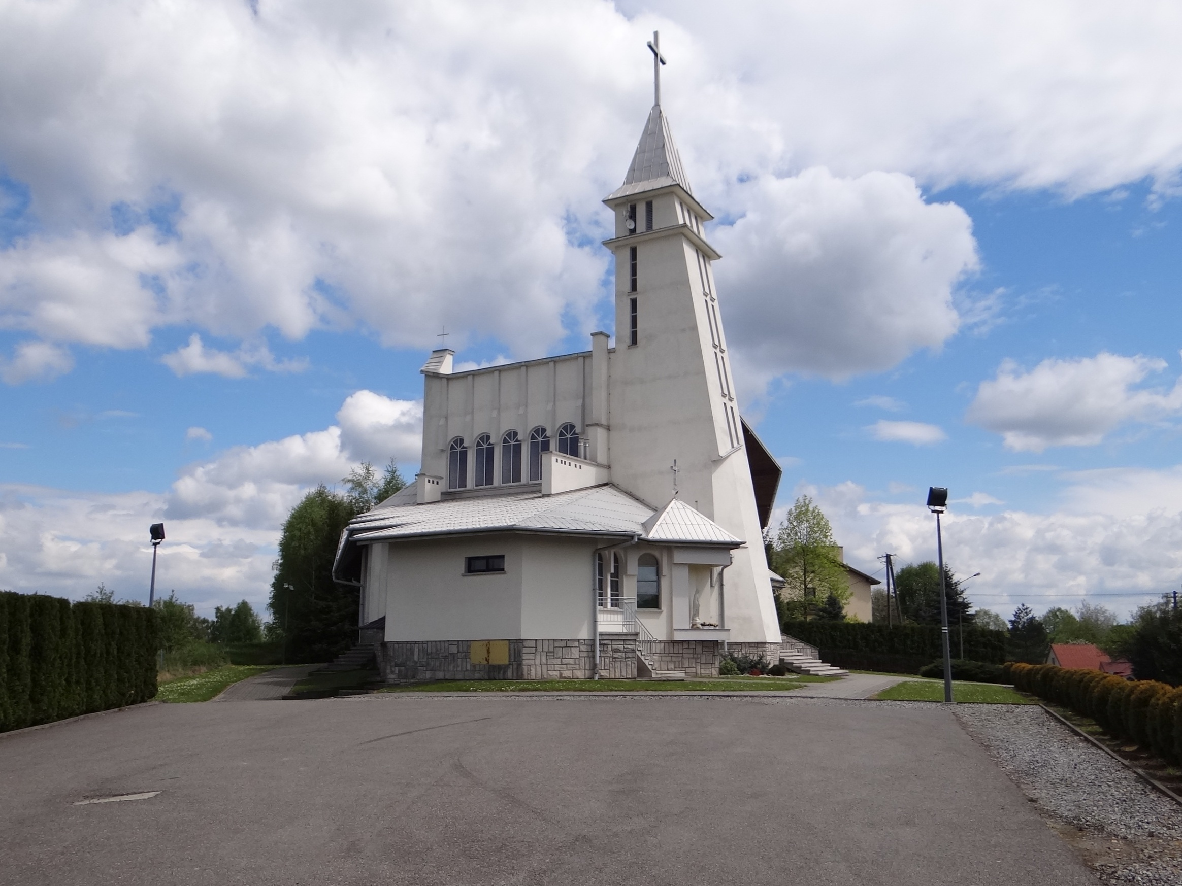 Meszna Opacka. Kościół